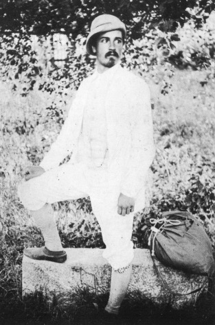 Ilmari Krohn kiersi Suomea ja keräsi kansansävelmiä 1880-luvulla.